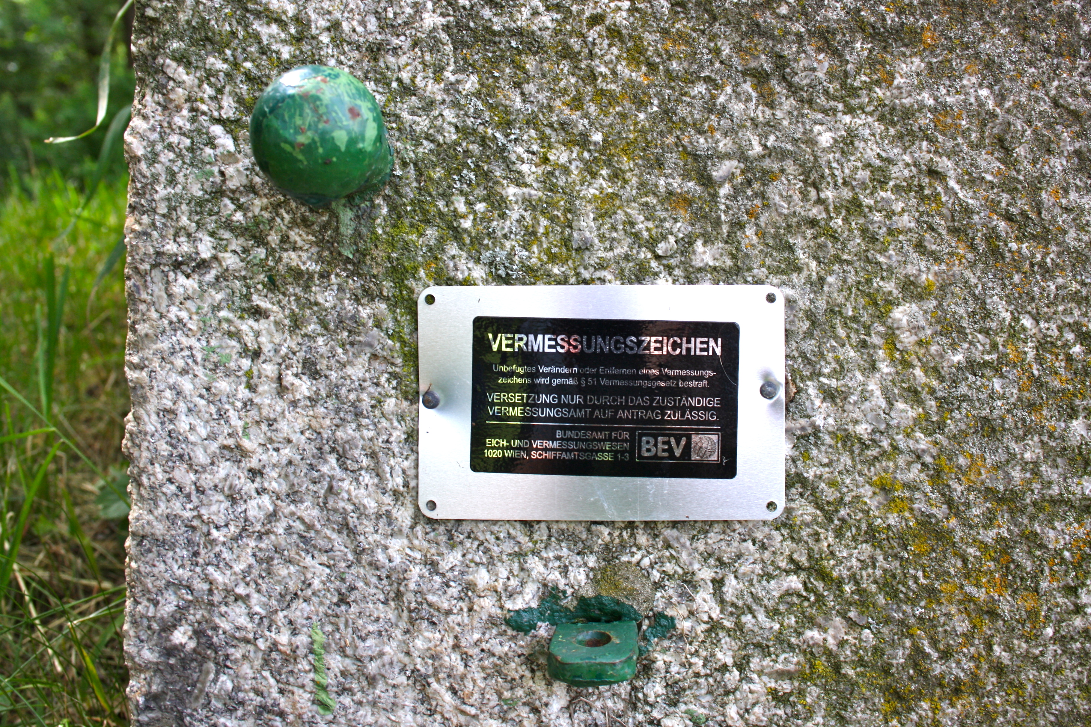 Vermessungszeichen des Bundesamts für Eich- und Vermessungswesen am Einsteigturm 119 der II. Wiener Hochquellenwasserleitung am Kadoltsberg in Wien-Mauer. Links oben ein Höhenbolzen als Höhenfestpunkt, in der Mitte unten ein Ringbolzen, der - gemeinsam mit einem zweiten - einen sogenannten Gabelpunkt bildet.